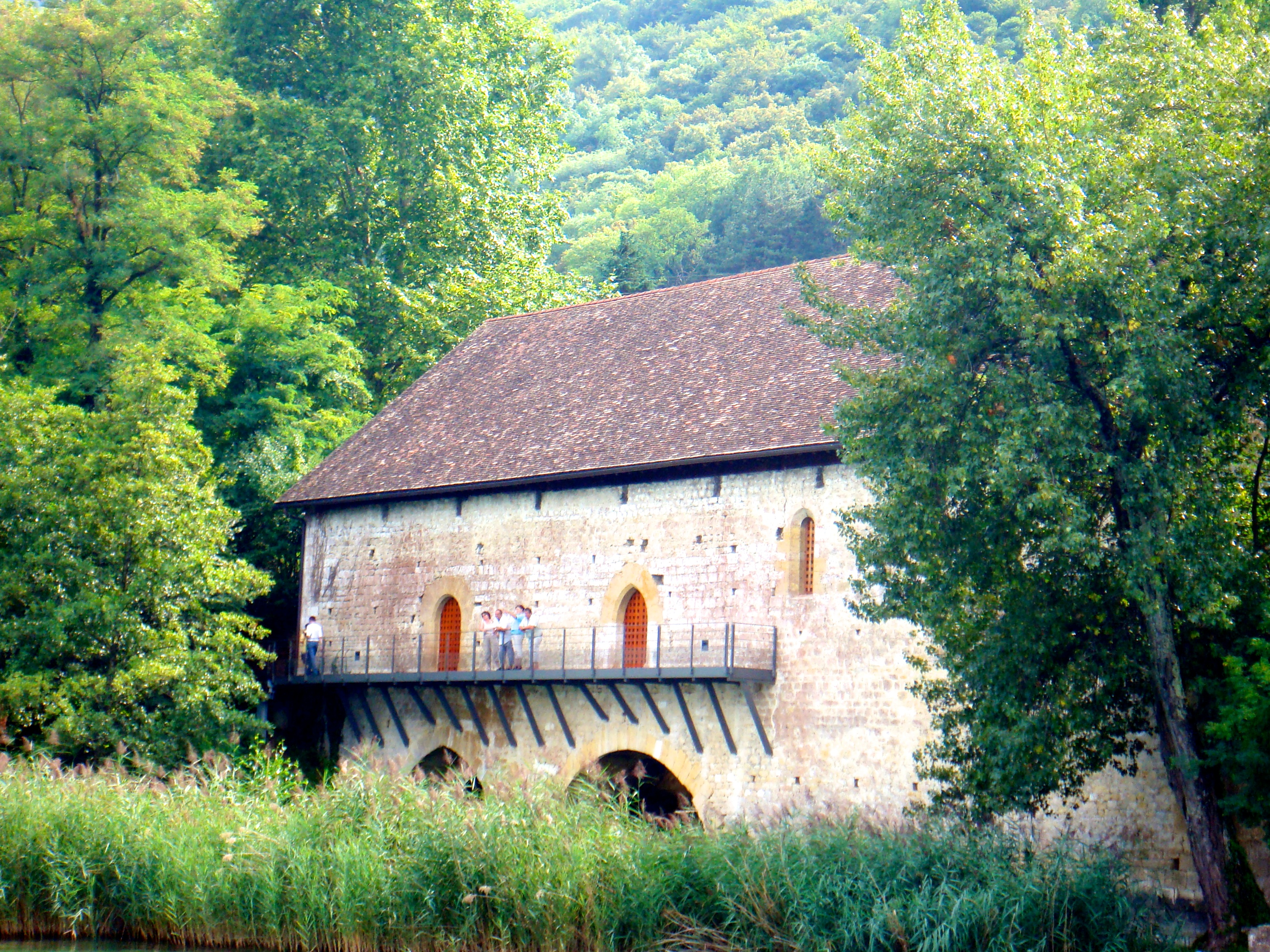 Grange batelière de l'abbaye d'Hautecombe, Savoie, France .